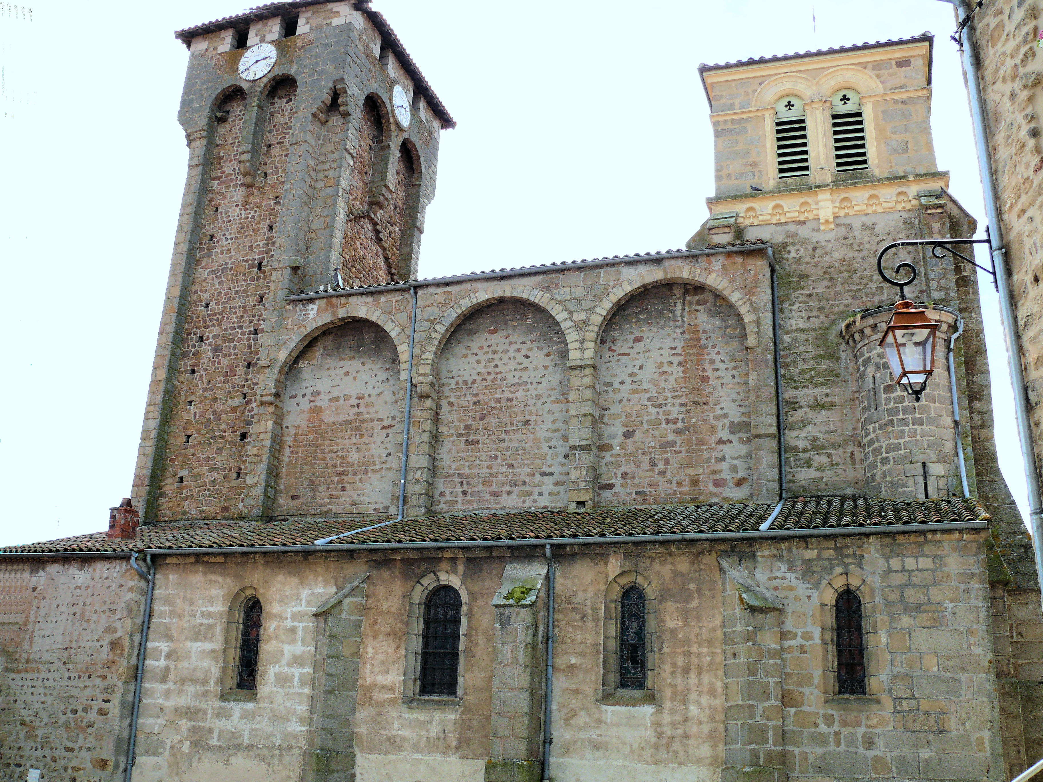 Marols - Eglise Saint-Pierre